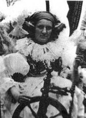 Františka Xavera Běhálková (1853-1907), industriální učitelka, národopisná pracovnice a sběratelka